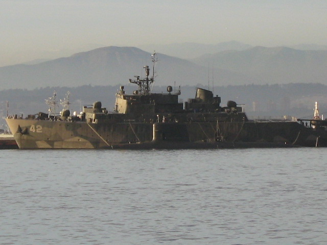 Buque Madre de Submarinos Almte Merino BMS-42; ex HMS Älvsborg (M02)